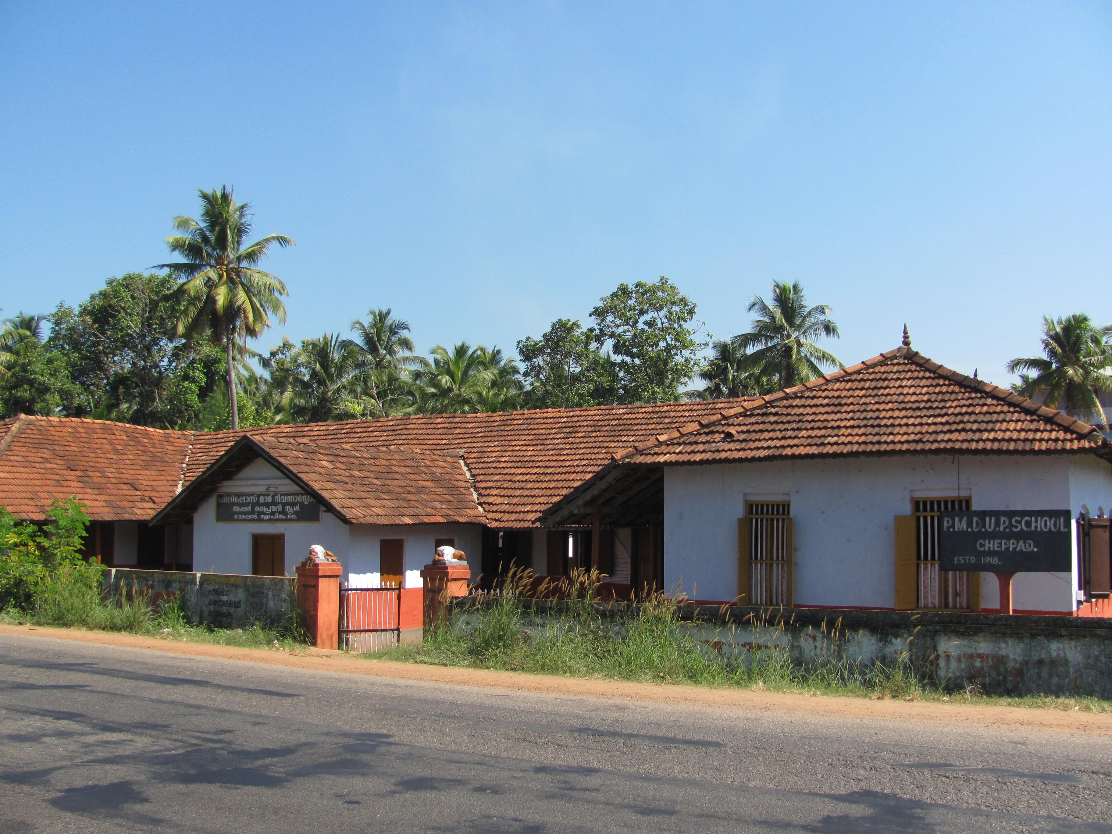 PMD UP school Cheppad